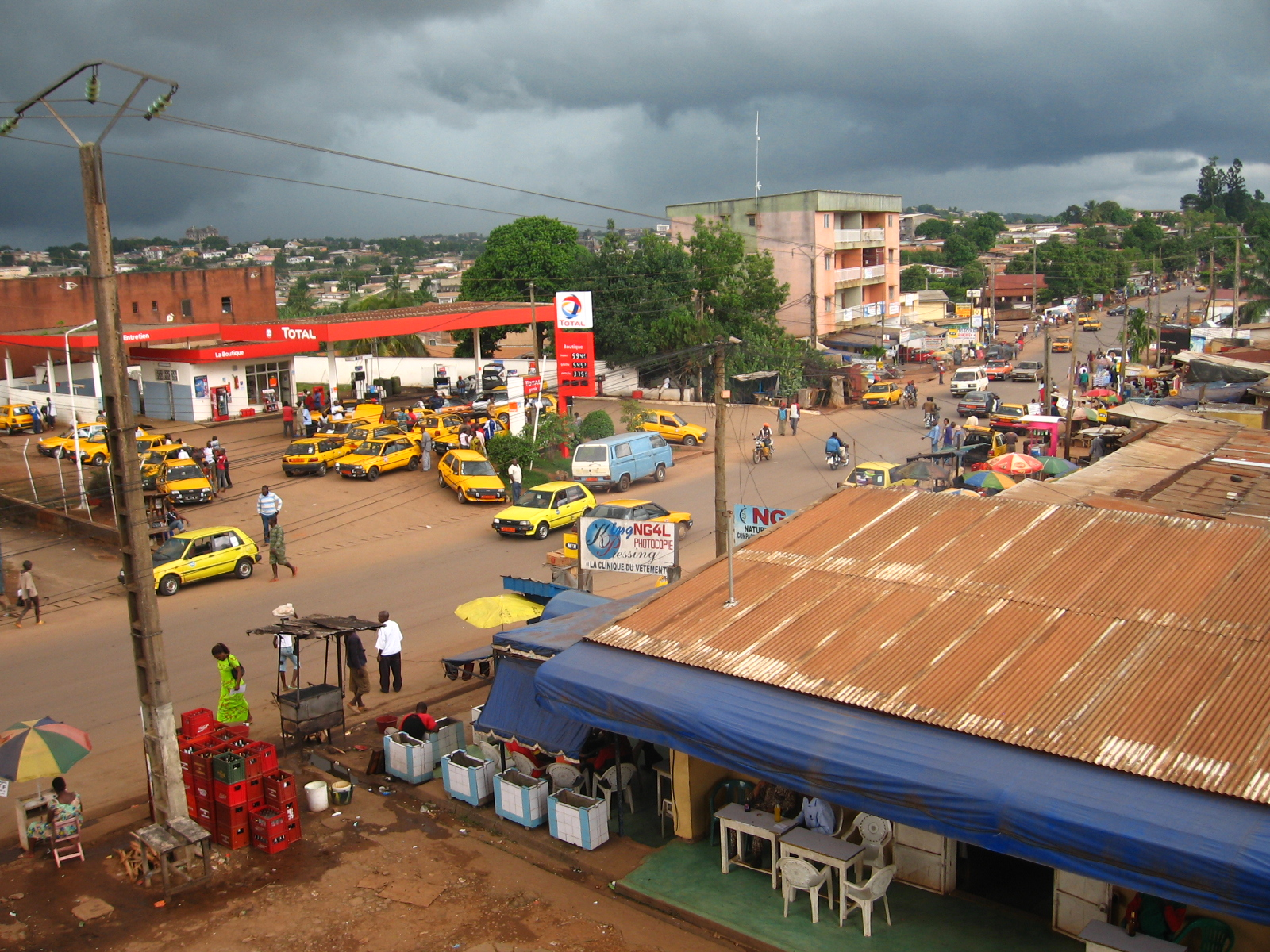 Photo d'une rue près du carrefour Biyem-Assi depuis une chambre d'hotel.